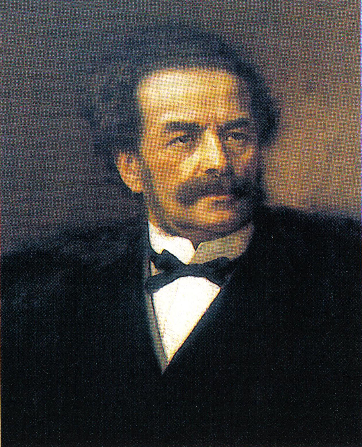 portrait